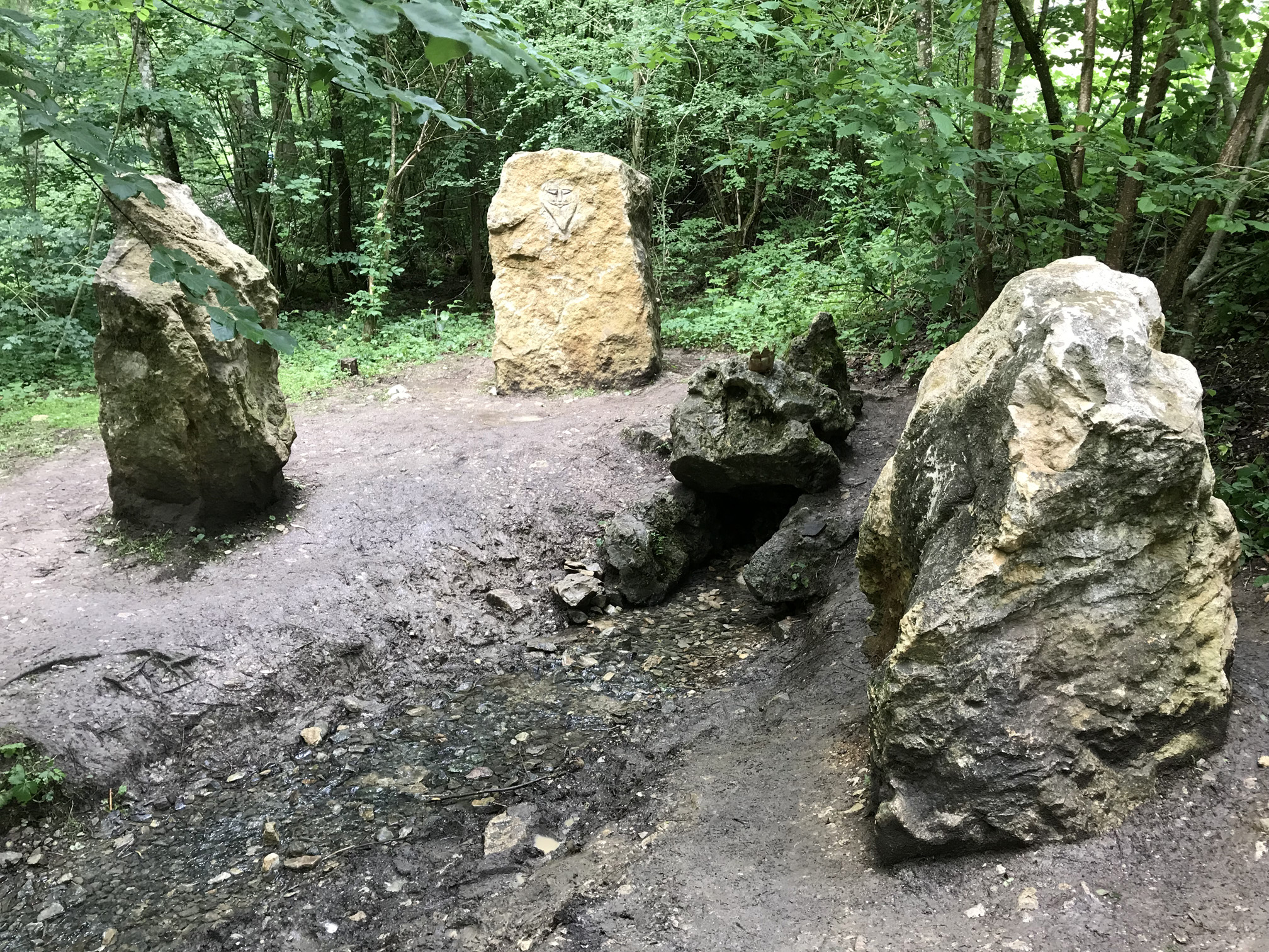 Remsursprung bei Essingen nach der Umgestaltung für die Remstal Gartenschau 2019